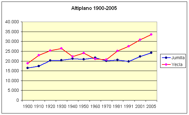 Población comparativa de Yecla y Jumilla The population of Jumilla and Yecla (comarca del Altiplano, Altiplano murciano), Murcia, Spain, (1900-2005). Own work, given to PD. Source: Instituto Nacional de Estadística.